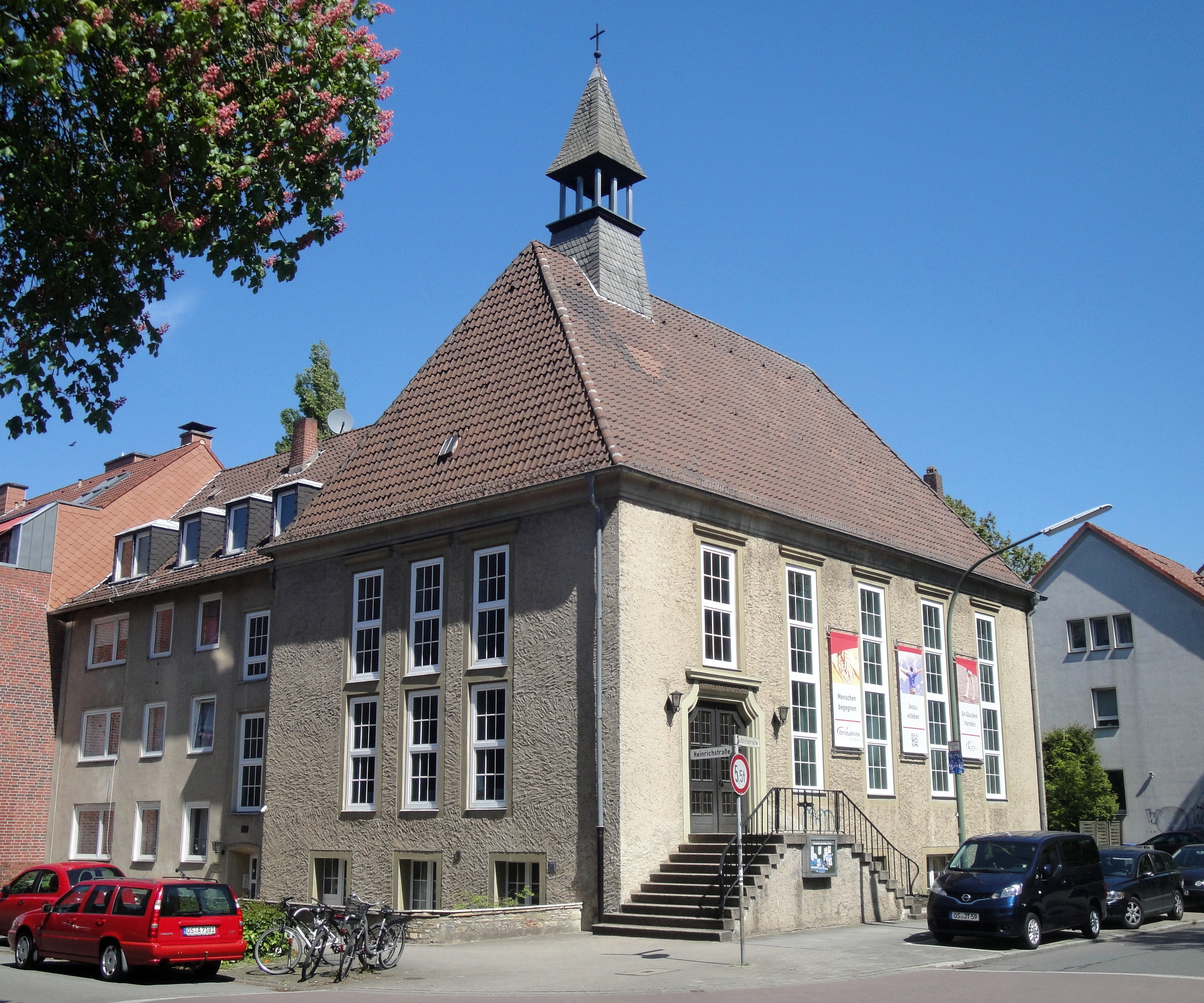 Evangelisch-methodistische Kirche, Christuskirche, Stadtkirche, Heinrichstraße/Ecke Schloßstraße, Osnabrück